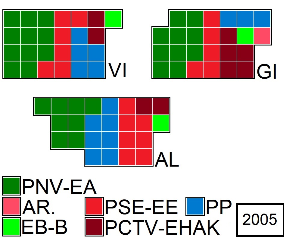 PAÍS VASCO 2005 JPEG